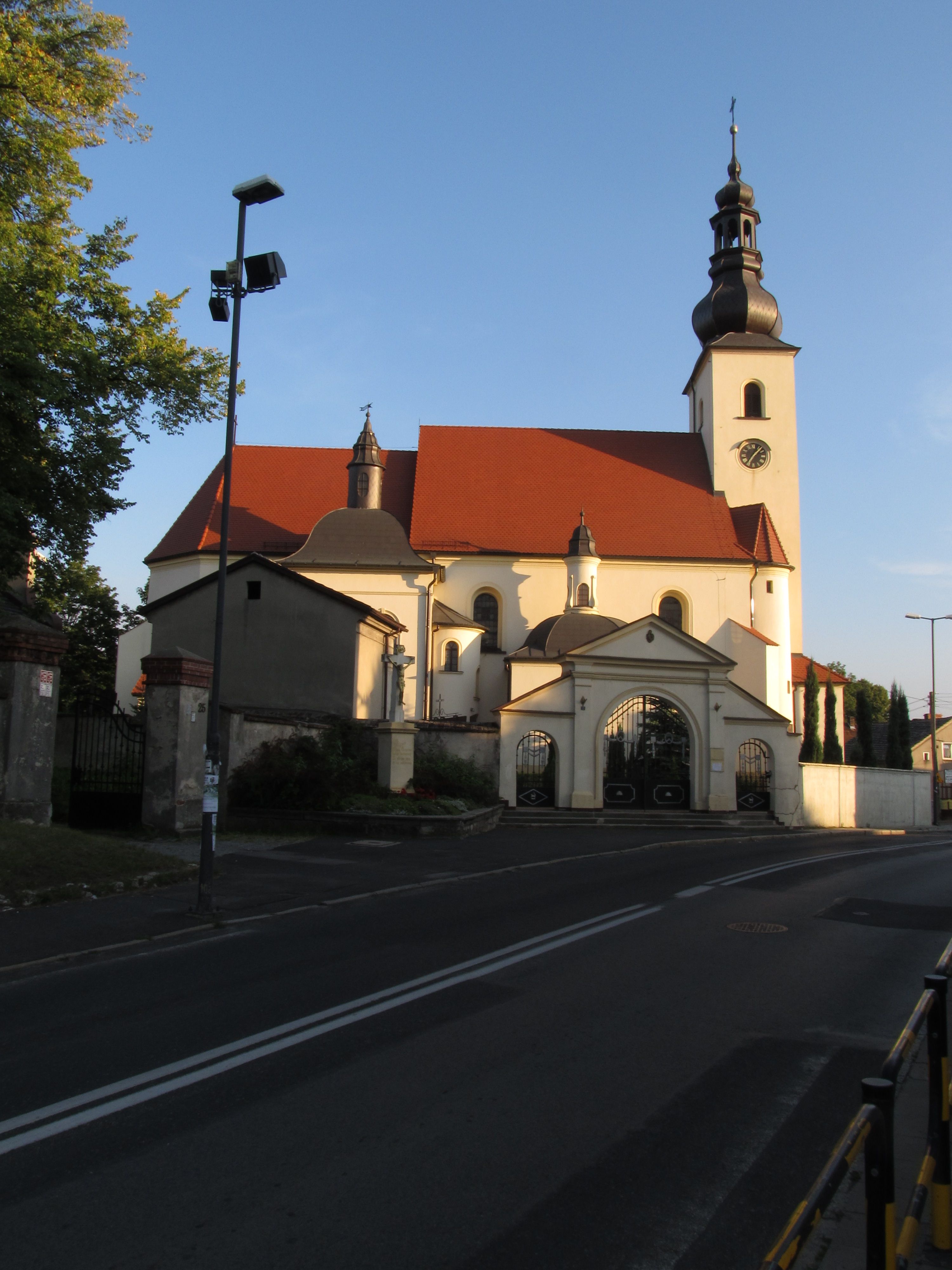 Gliwice Łabędy - kościół parafialny pw. Wniebowzięcia Matki Boskiejk (zabytek nr A/303/60)